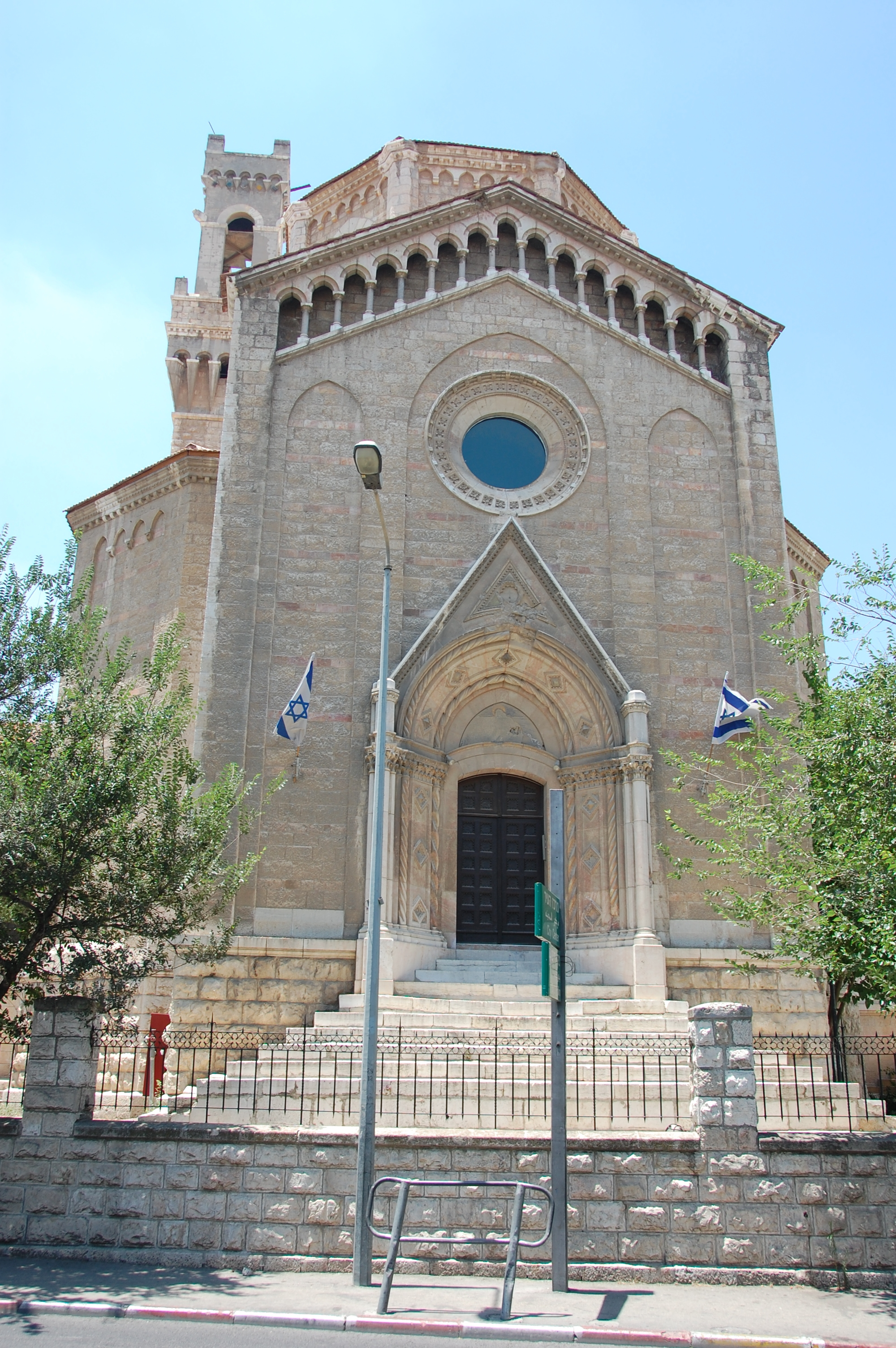 italian hospital jerusalem 2007